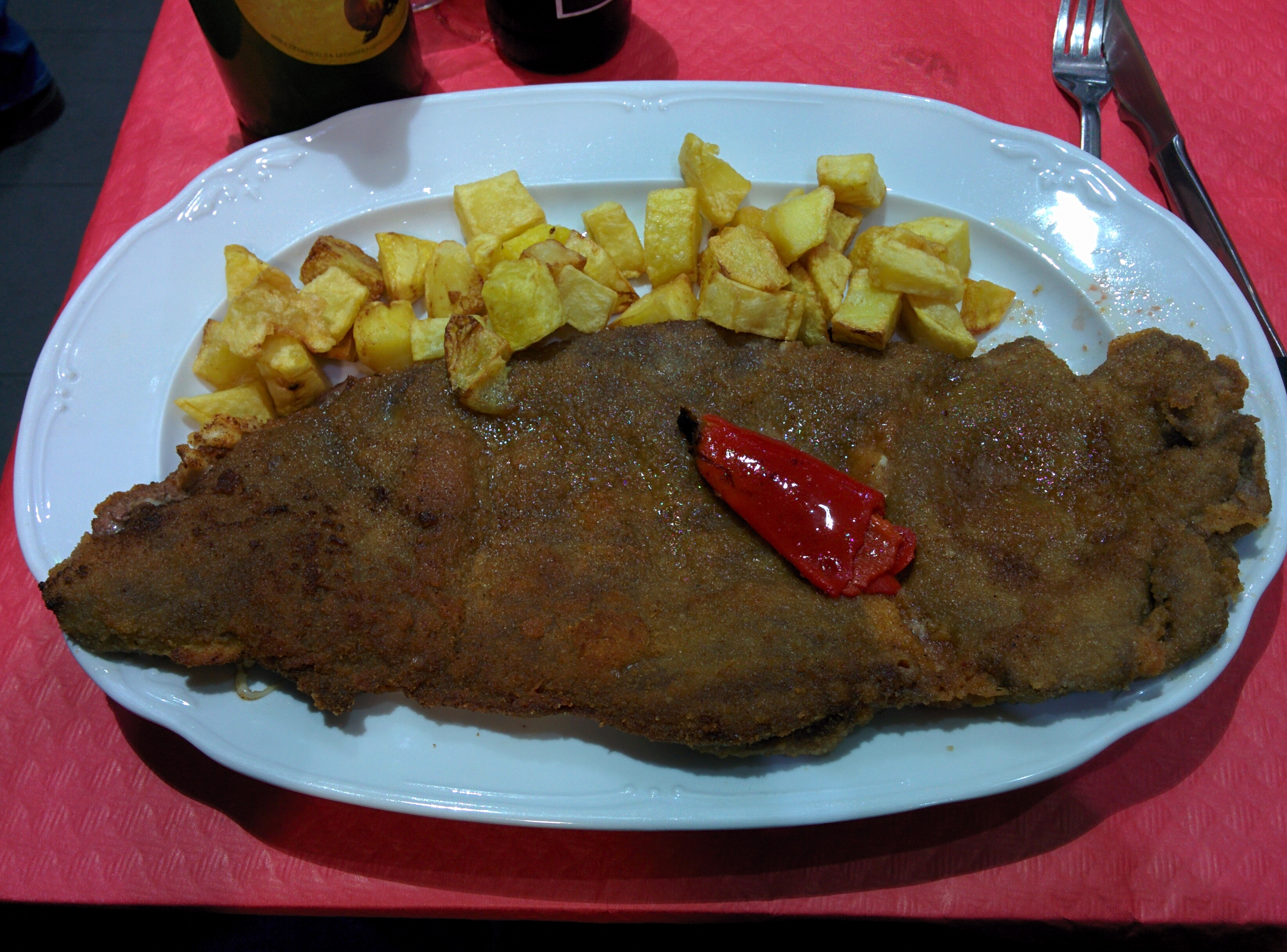 Cachopo servido en el restaurante Niza, en Oviedo (España).